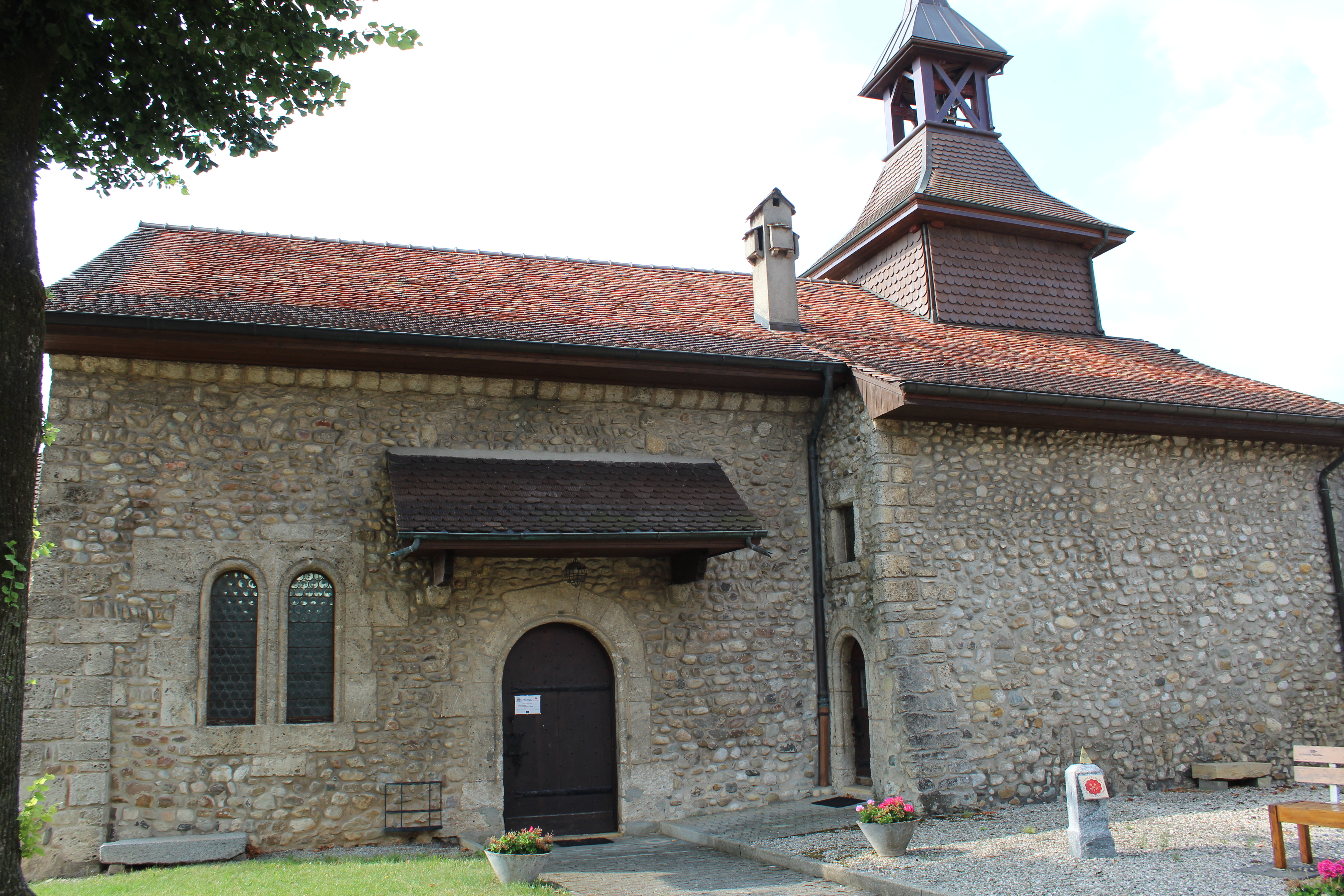 L'église.